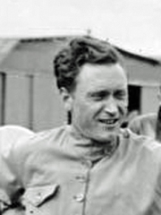 ADN-Zentralbild-Archiv Die Kunstflugmeisterschaften 1931 in Berlin-Tempelhof. UBz: Gerhard Fieseler und Vera von Bissing beobachten den Flug ihrer Kollegin Liesl Bach. 29145-31